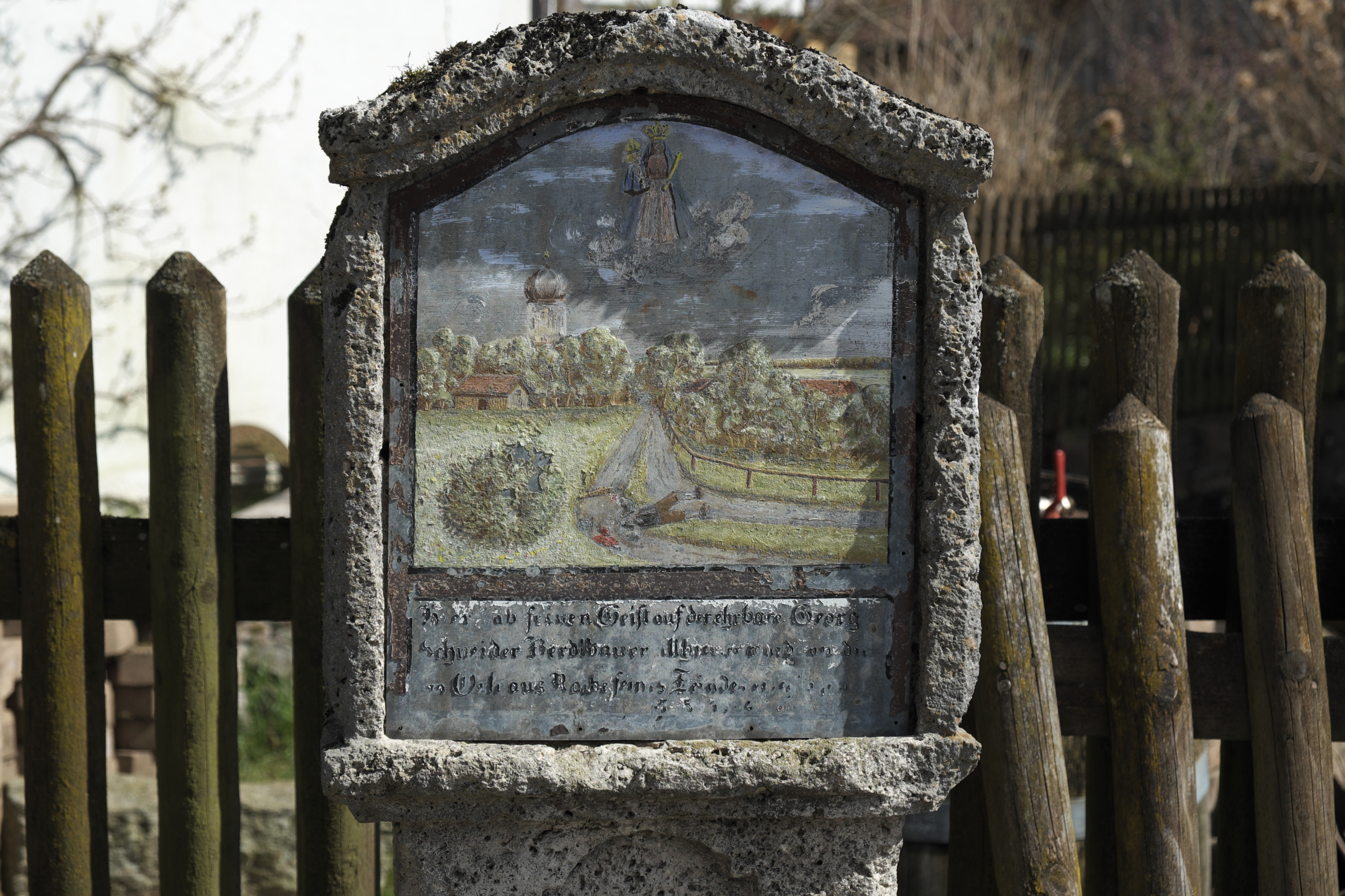 Bildstock in Aying im Landkreis München (Bayern/Deutschland)